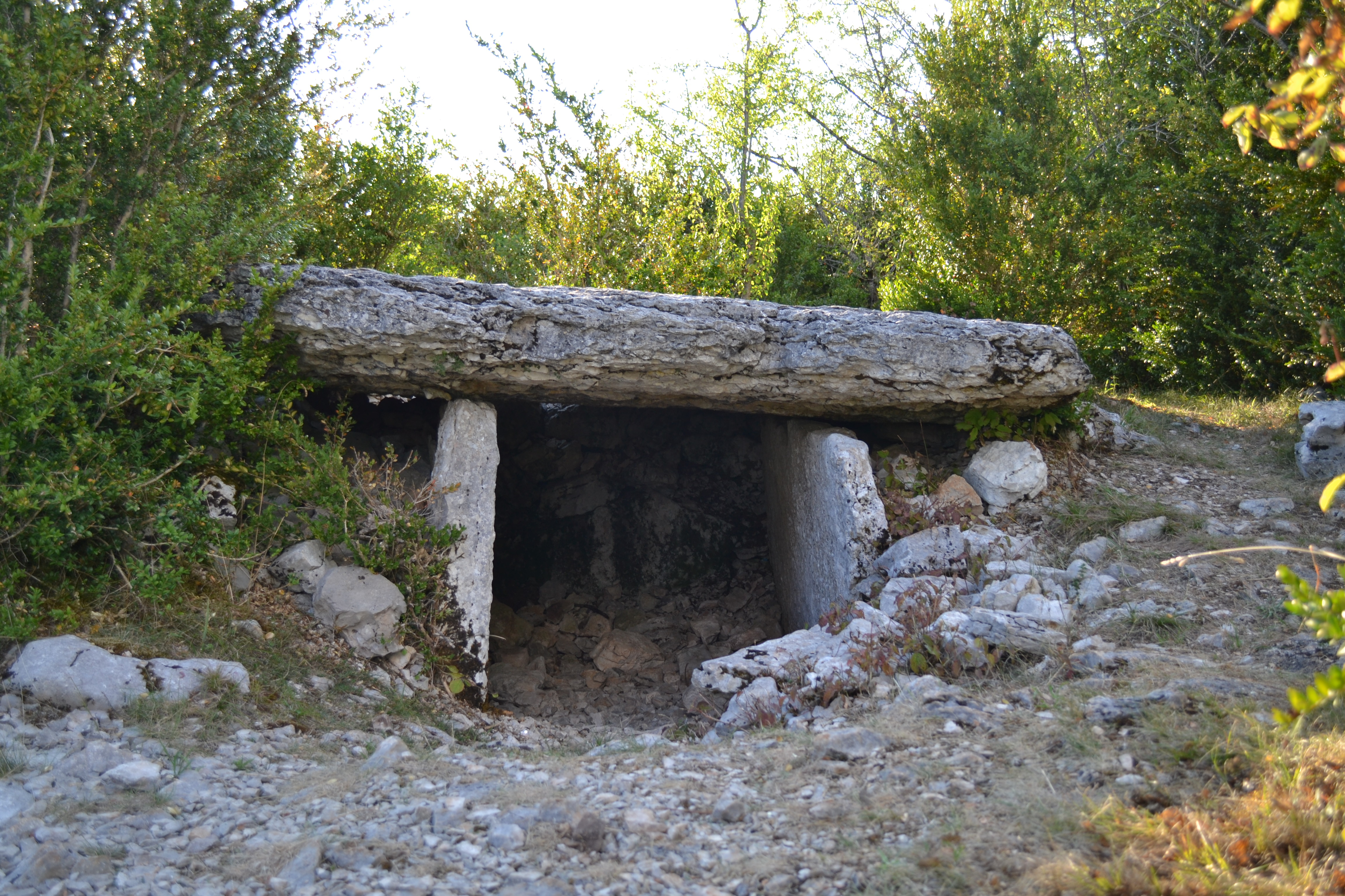 Dolmen n°1 du Mas d'Ajarc, appelé aussi Dolmen du Pech del Cayre à Cabrerets, Lot